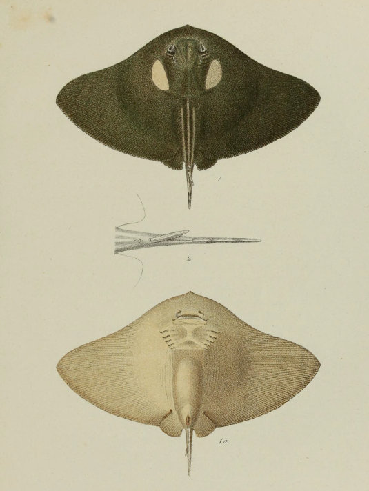 Атлантический скат-бабочка